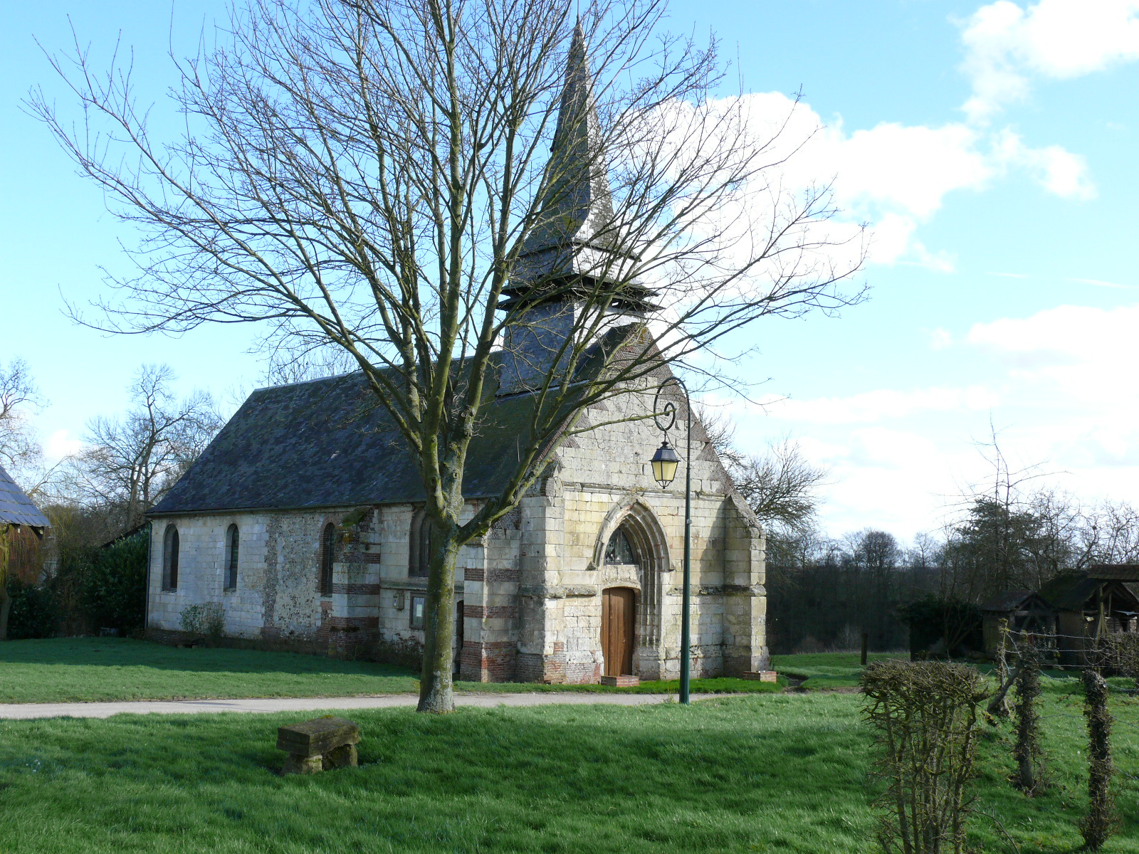 Laverrière (Oise) - L'église